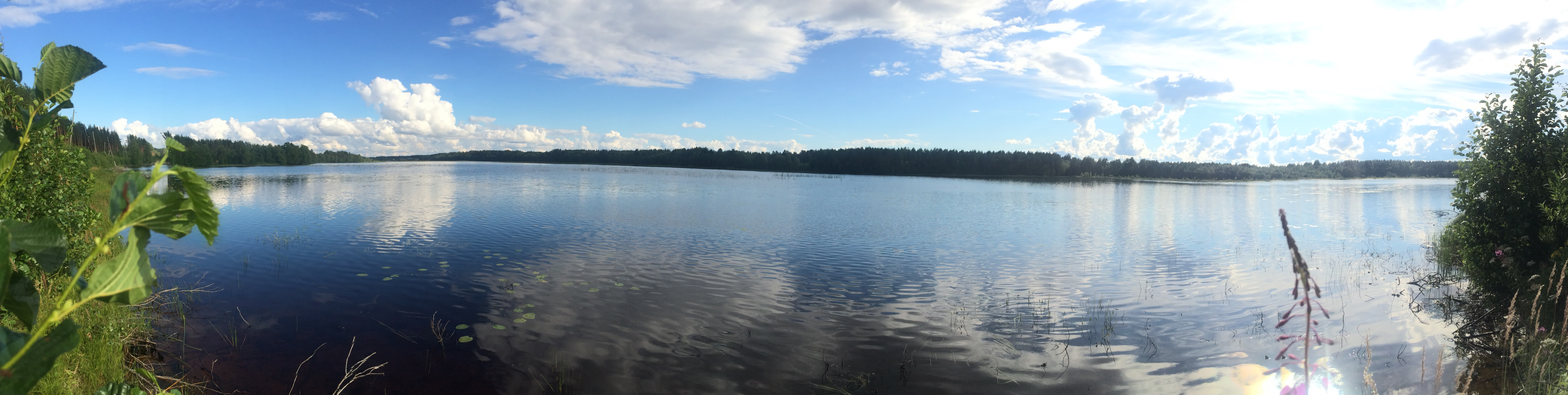 Лахтанперя